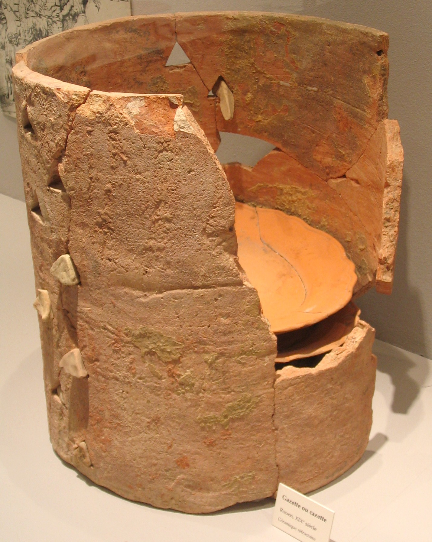 Cazette du XIXe siècle. Les pièces sont séparées à l'aide de pernettes introduites dans la paroi de la cazette. Musée de la céramique de Rouen.